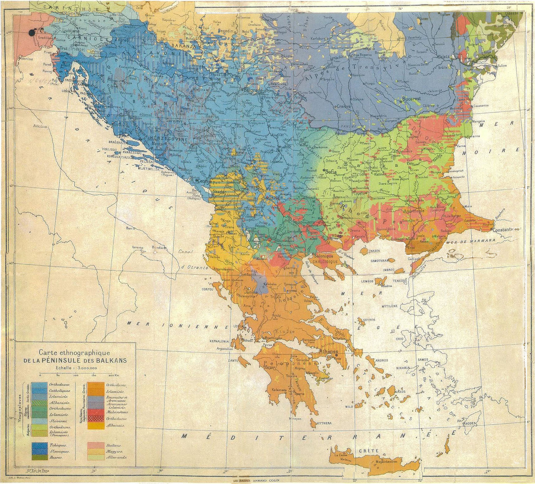 Composición étnica en los Balcanes y en Macedonia xx c